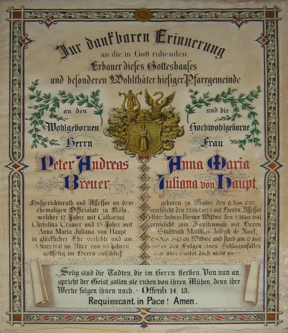 Erinnerungsblatt an die Stifter von St. Remigius in Köln-Sürth.